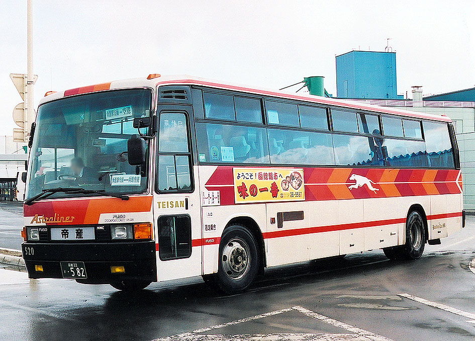 函館帝産バス 函館空港連絡バス 三菱ふそう・エアロバス